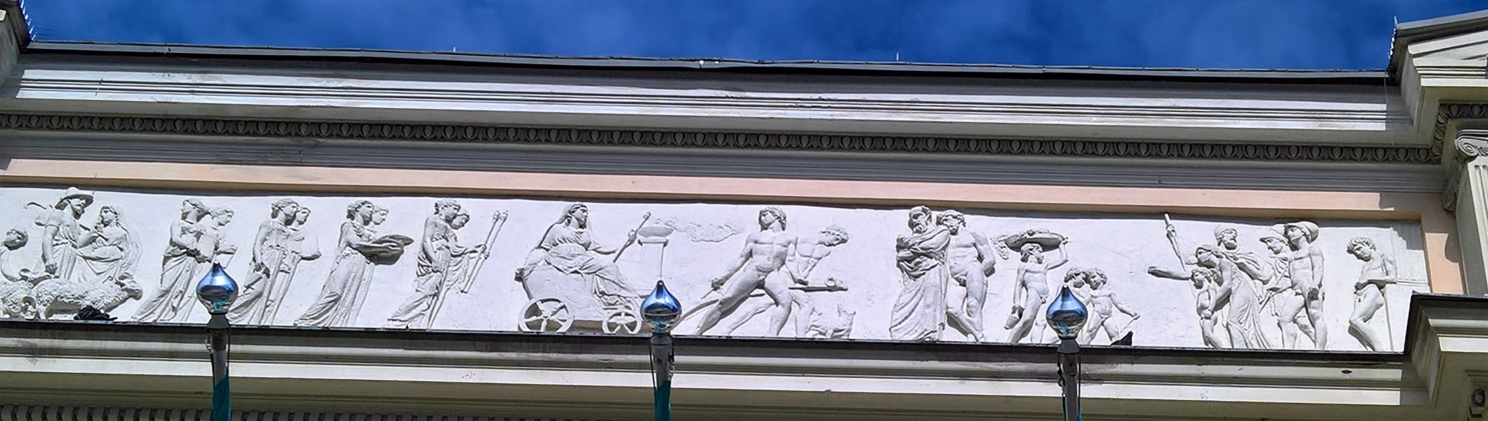 Kuva Walter Runebergin reliefifriisistä Helsingin Vanhan ylioppilastalon julkisivussa, pääsisäänkäynnin yliäpuolella